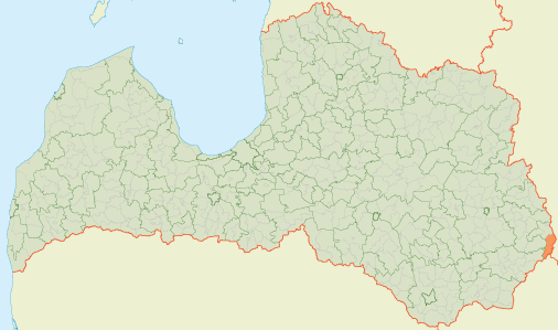 Пасиенская волостьLatviešu: Pasienes pagasts